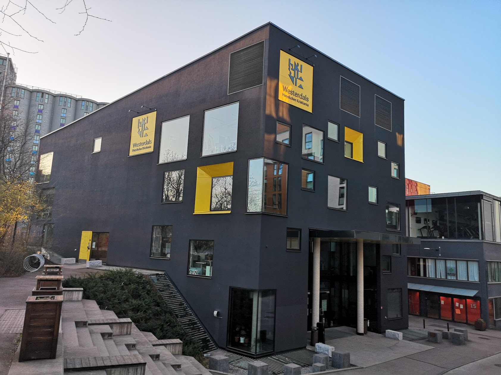 Høyskolen Kristiania sin avdeling på Vulkan i Oslo. Åpnetsom hovedbygget til Westerdals i 2011 og ble en del av Høyskolen i Kristiania i 2017.